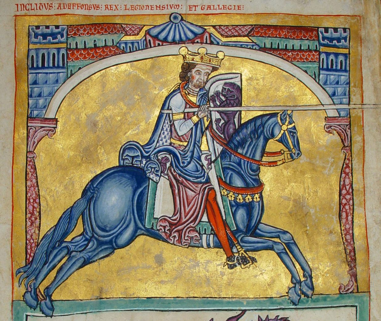 Miniatura medieval que representa al rey Alfonso IX de León.